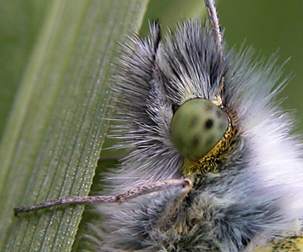 Aurorafalter (anthocharis cardamines), aufgenommen auf einer Wiese am Waldrand von Oppenrod